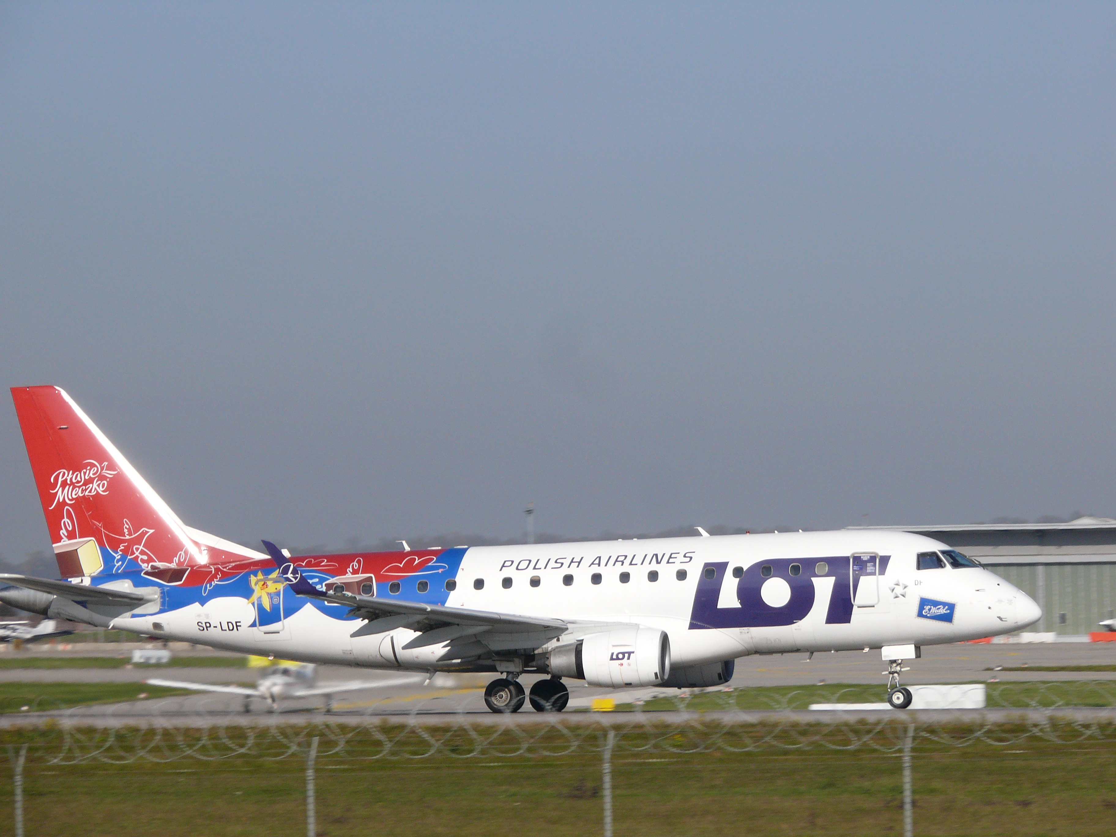 Eine Embraer 170 der LOT (mit Sonderbemalung) beim Start am Flughafen Stuttgart.